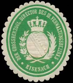 Sealing stamp Title: Der Gr. Director des III. Verwaltungsbezirks Eisenach Description: grün, weiß, geprägt Place: Eisenach size: 4x4 cm